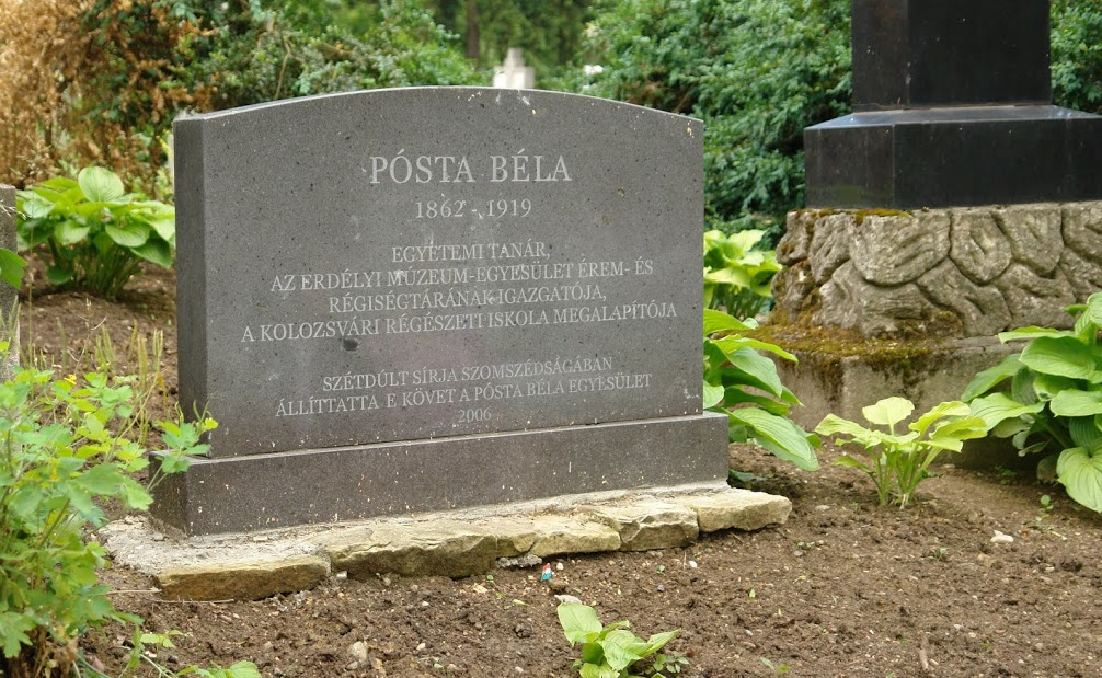 Pósta Béla sírja Kolozsváron, a Házsonygárdi temetőben